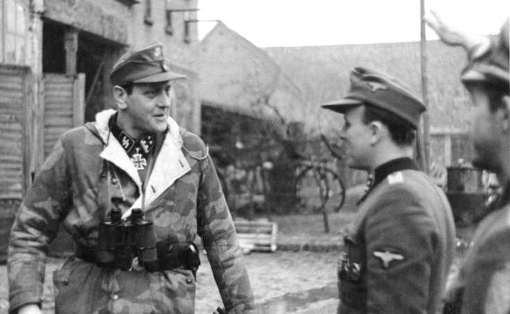 SS-Obersturmbannführer Otto Skorzeny an der Oder ADN-Zentralbild /Archiv Februar 1945 Ritterkreuzträger SS-Obersturmbannführer Skorzeny, der Mussolini zur Flucht verhalf, bei einer Lagebesprechung mit SS-Führern einer SS-Fallschirmjäger-Einheit. (an der Oder 1945) [Scherl Bilderdienst] Abgebildete Personen: Skorzeny, Otto: SS-Hauptsturmführer, Ritterkreuz (RK), Waffen-SS, Deutschland (PND 118614886)